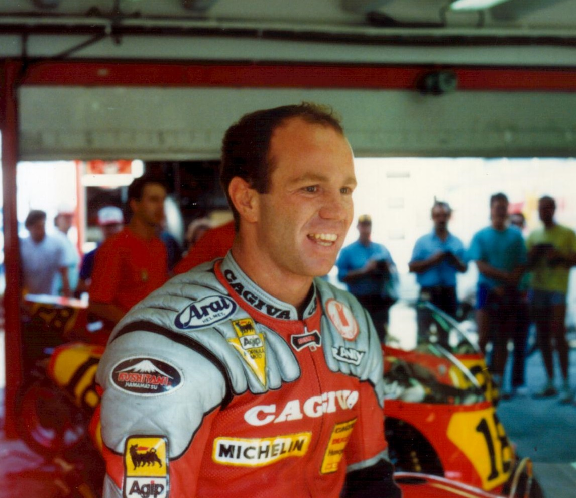 Durant les essais le jour précédant la course.